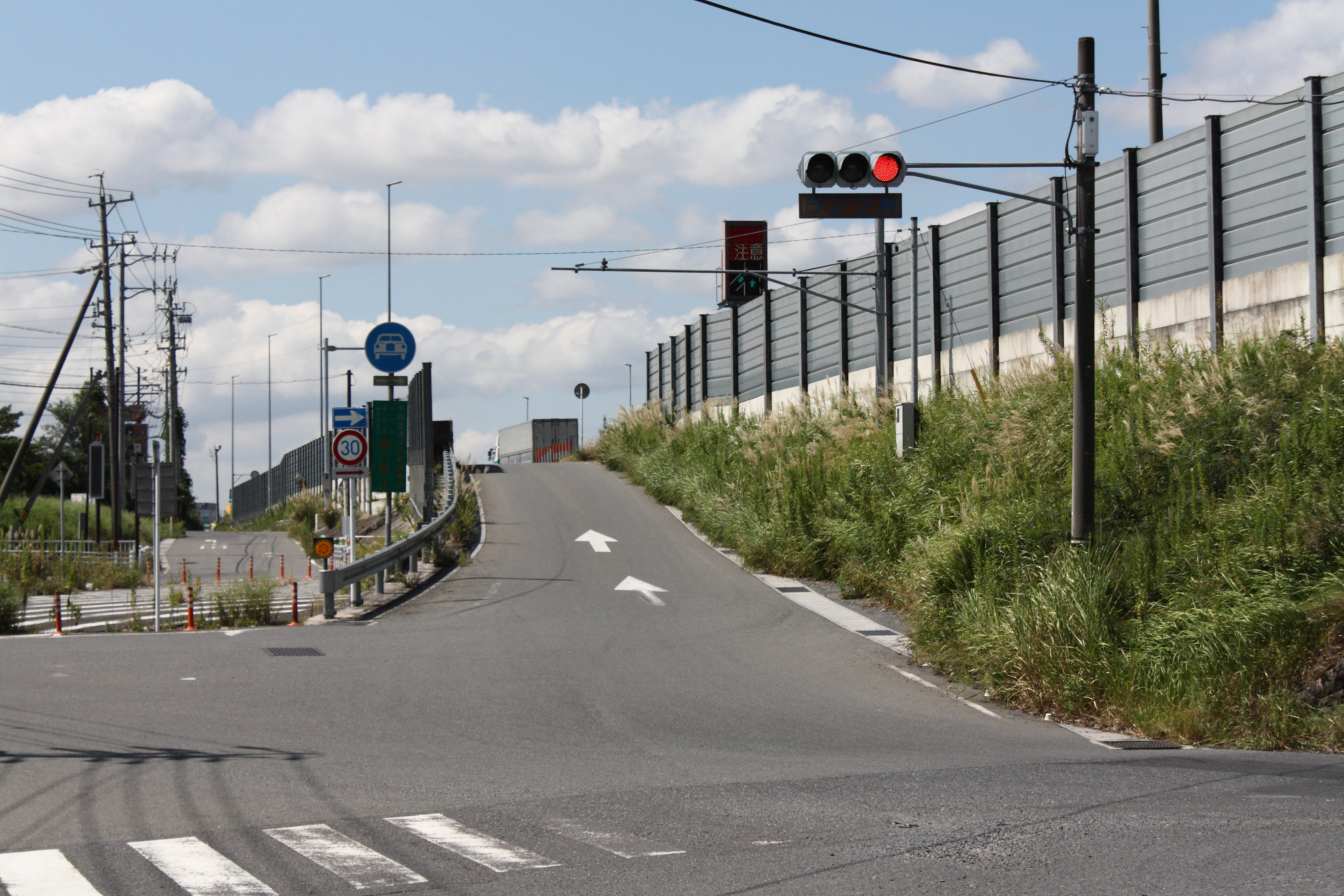 名阪国道 壬生野インターチェンジ（ダイヤモンド型） 天理方面入口 三重県伊賀市川西